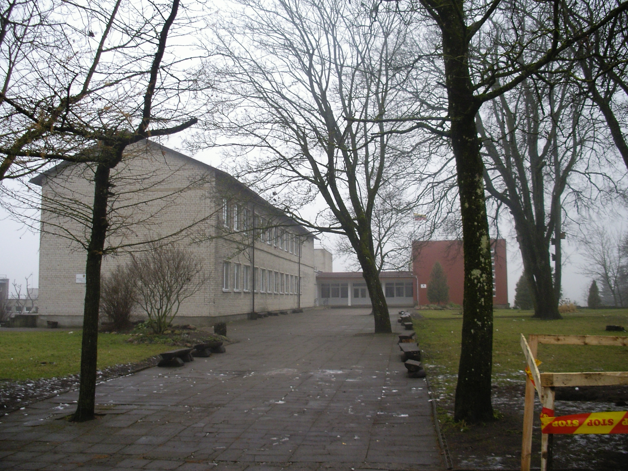 Rietavo savivaldybės Tverų vidurinė mokykla